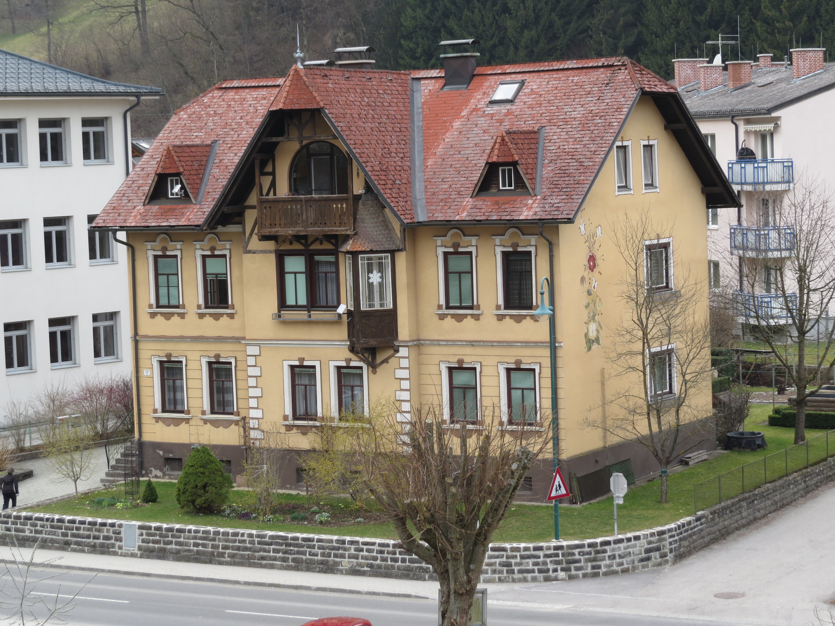 2017-03-17 Das Doktorhaus in Frankenfels, im Hintergrund links die Schule